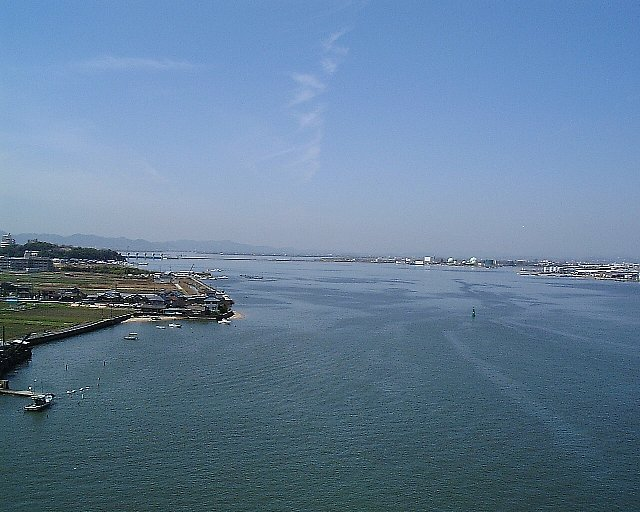 児島湾大橋から児島湾（児島湖）を西望する